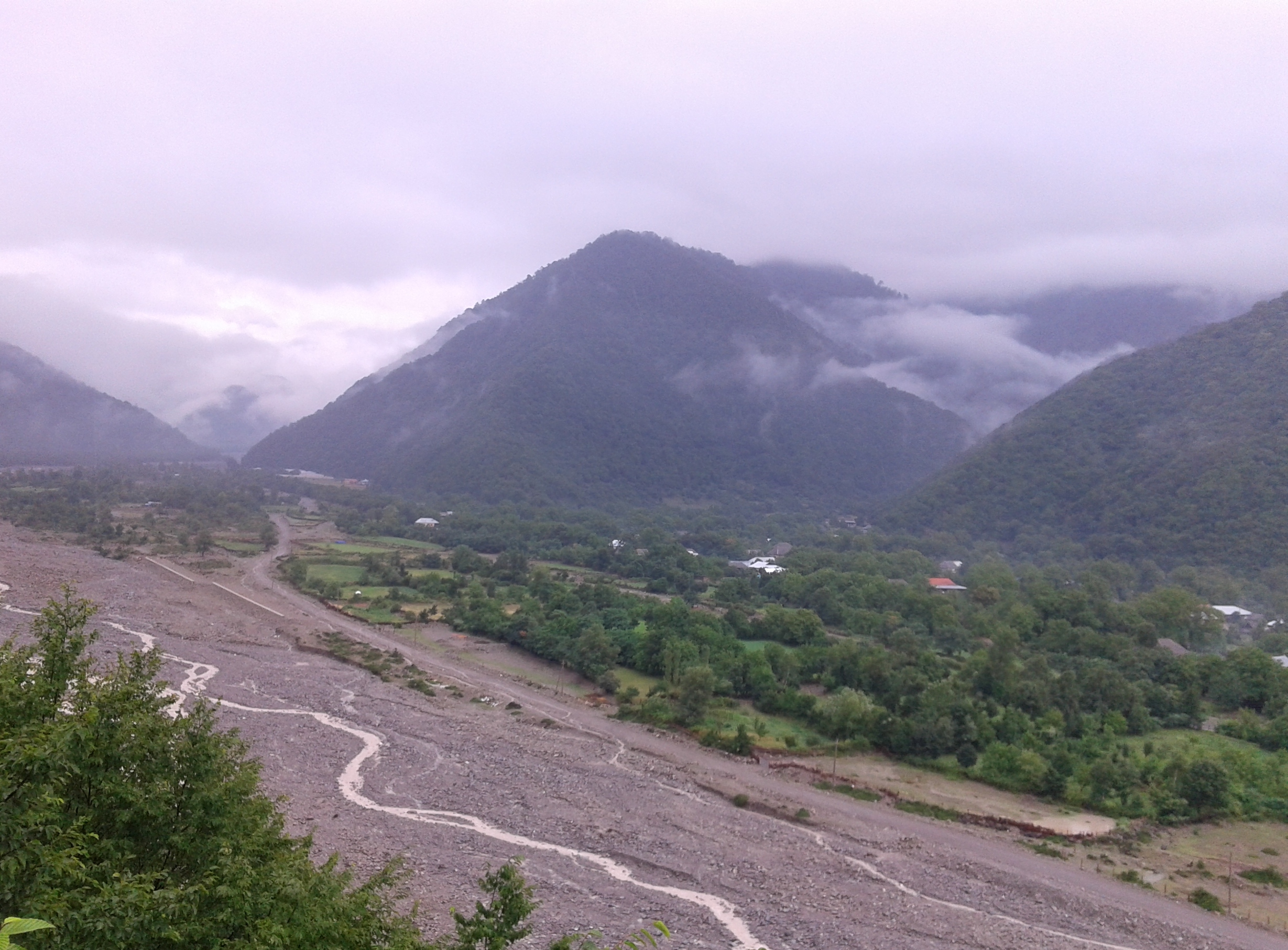 Dağ Şəki